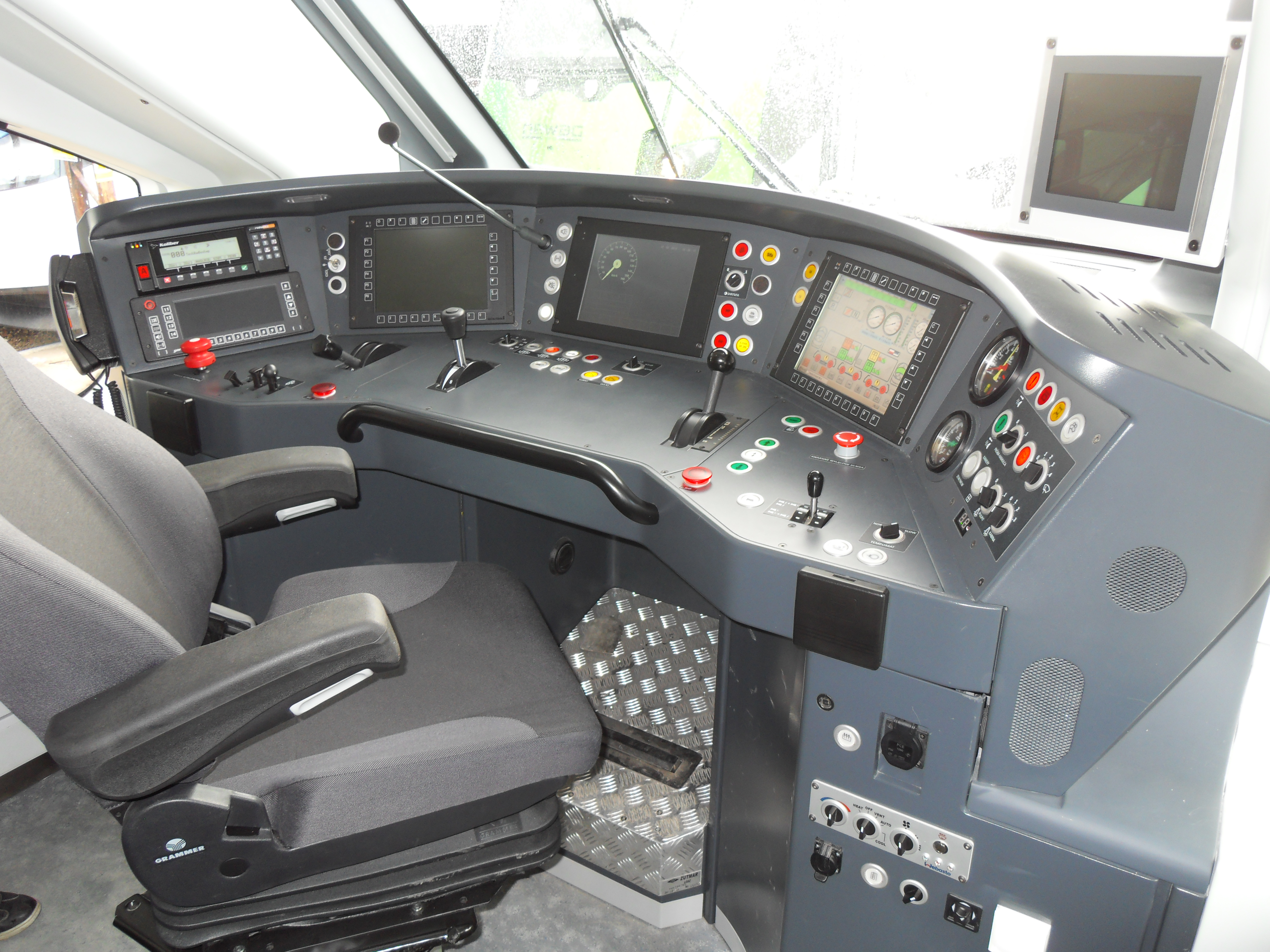 TRAKO 2013 w Gdańsku: PESA SA139-002.